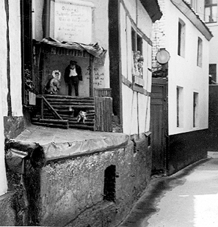 Anläßlich der 500-Jahr-Feier 1937 in Ruhrort wurden diese Figuren in der damaligen Altstadt aufgestellt, um die prekäre sanitäre Situation in Ruhrort zu verdeutlichen. Der Text in Ruhr'sch Platt dazu war folgender: "Stinn, stohn op, eck mot ock es drop!"